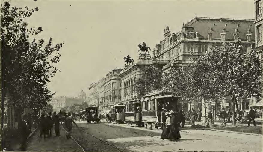 Wien. Details siehe Dateiname.